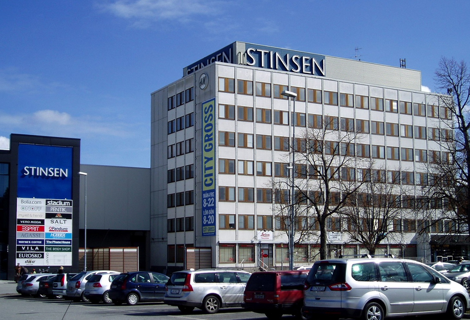 Stinsen köpcentrum i Häggvik, Sollentuna kommun